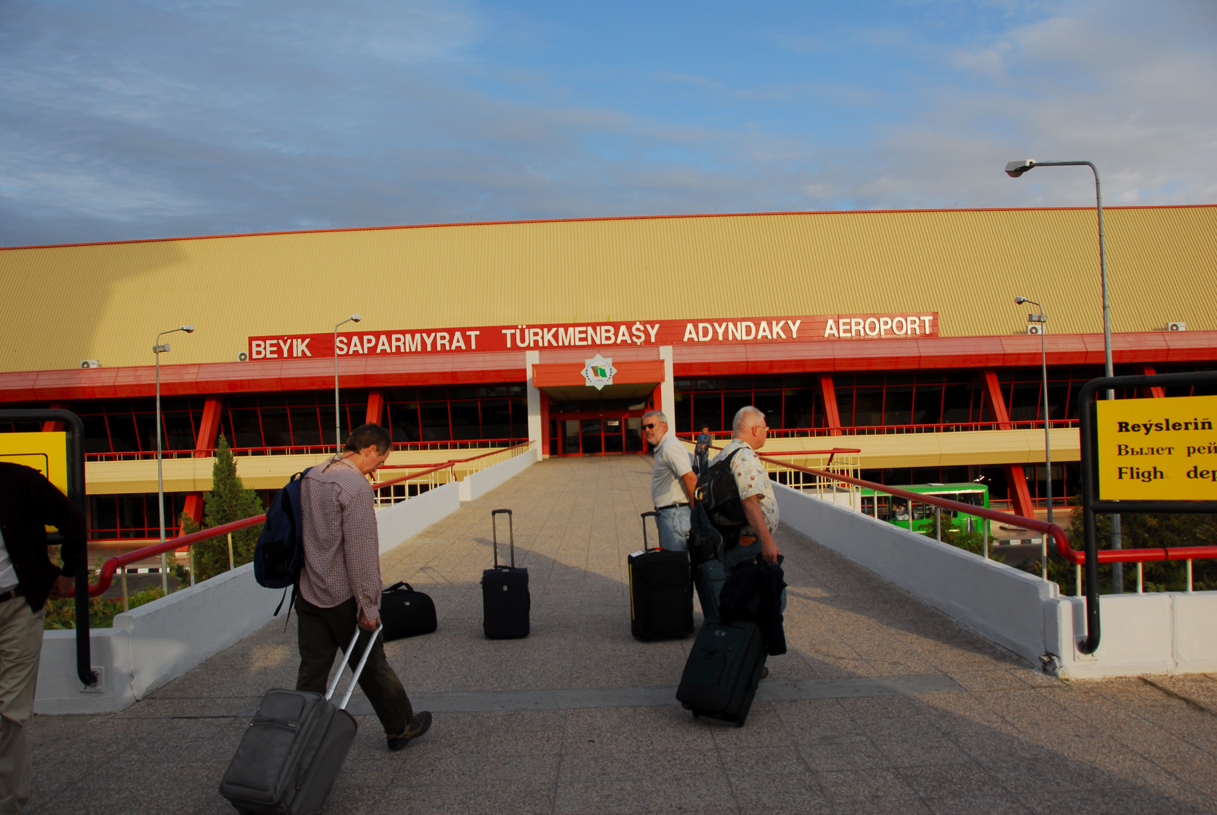 stans08-098